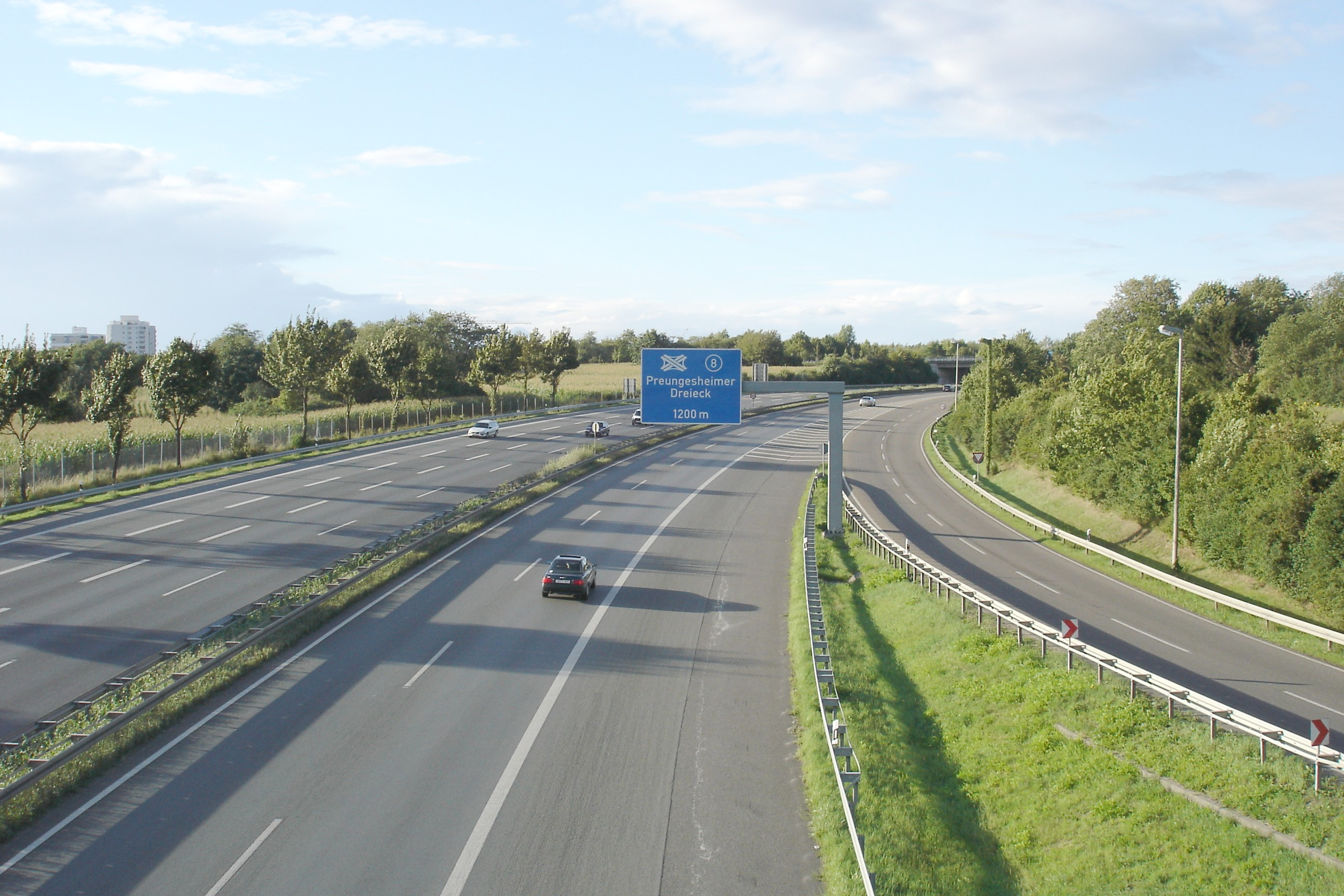 A 661 an der Friedberger Landstraße, Richtung Nord